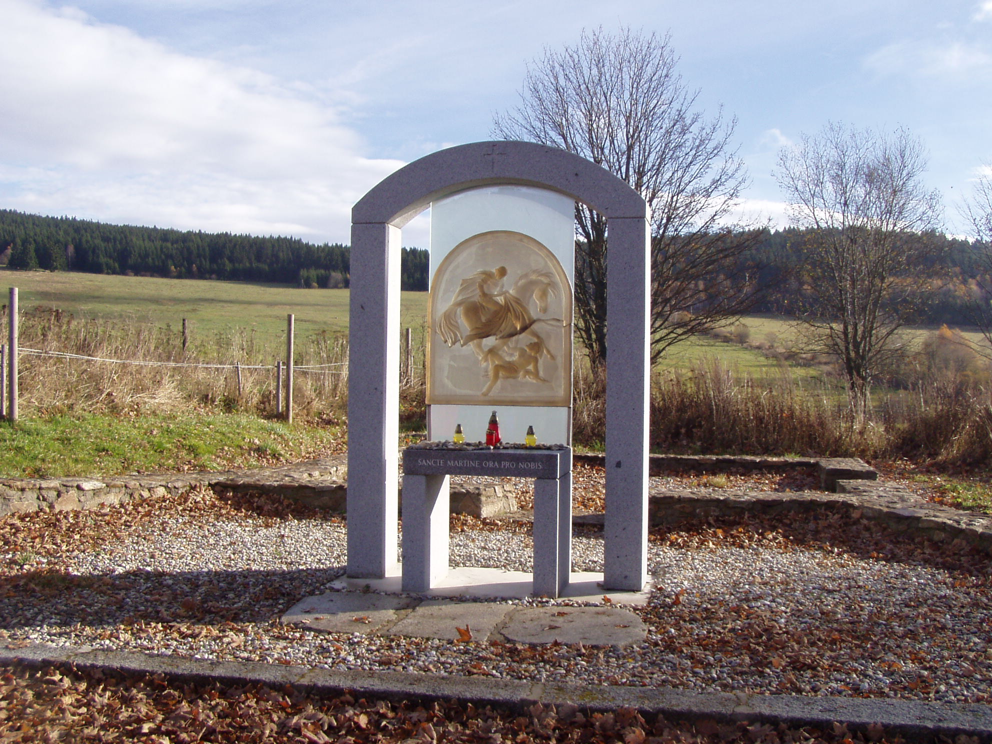 Kostel sv. Martina (Nový Svět)